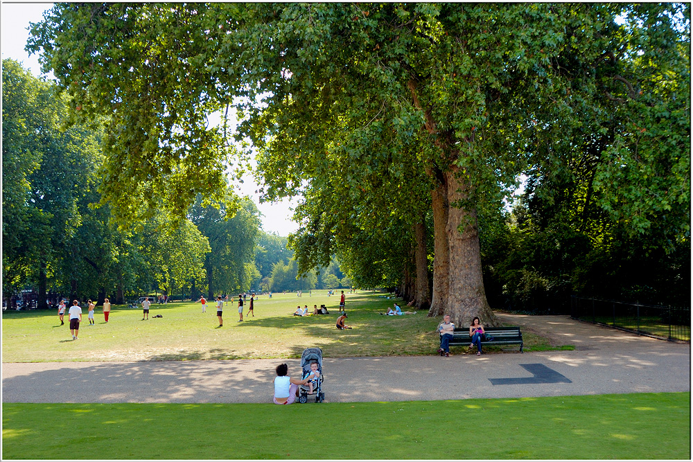 Hyde Park.